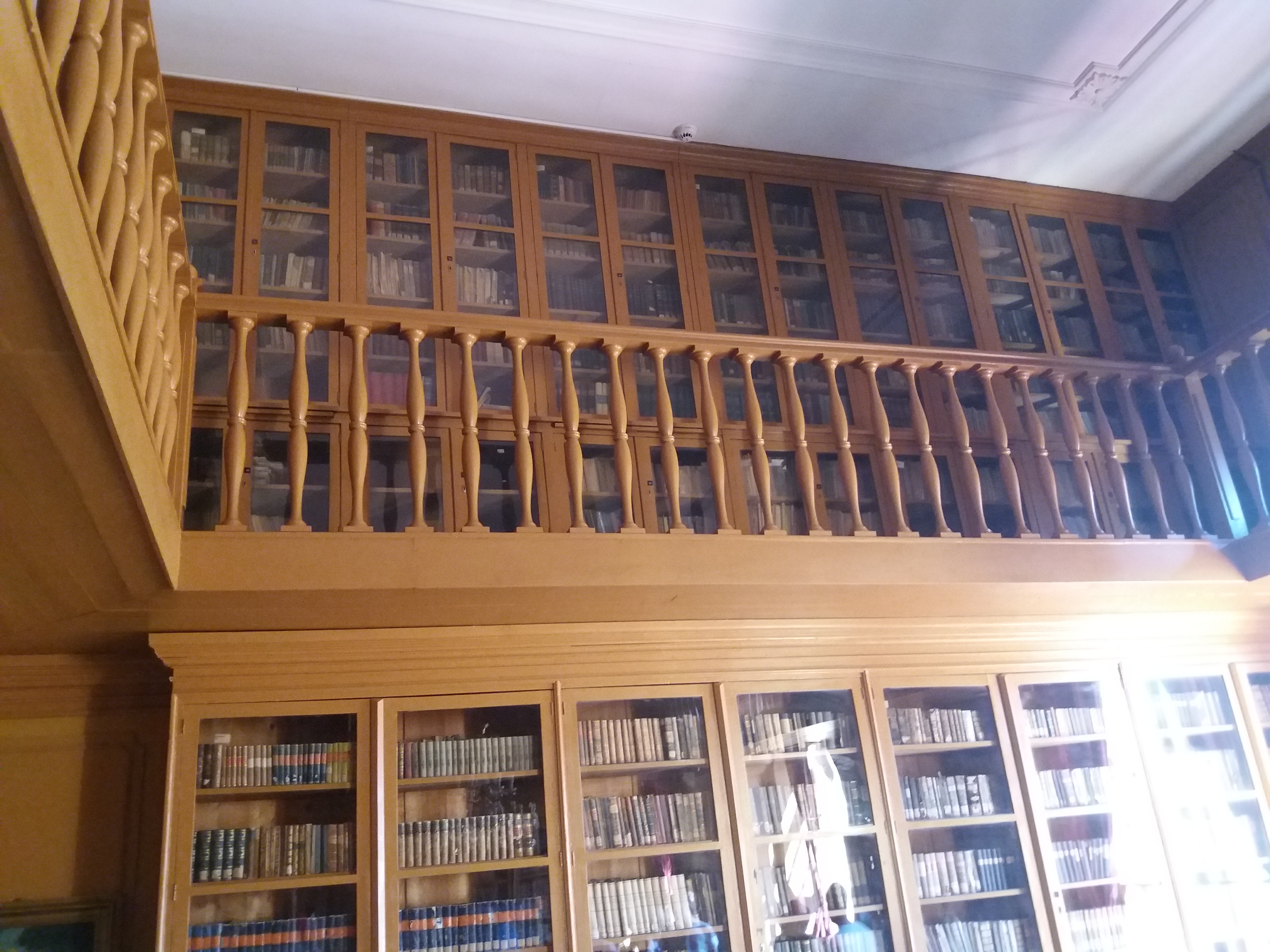 Srpski (latinica): Karlovačka gimnazija, Sremski Karlovci